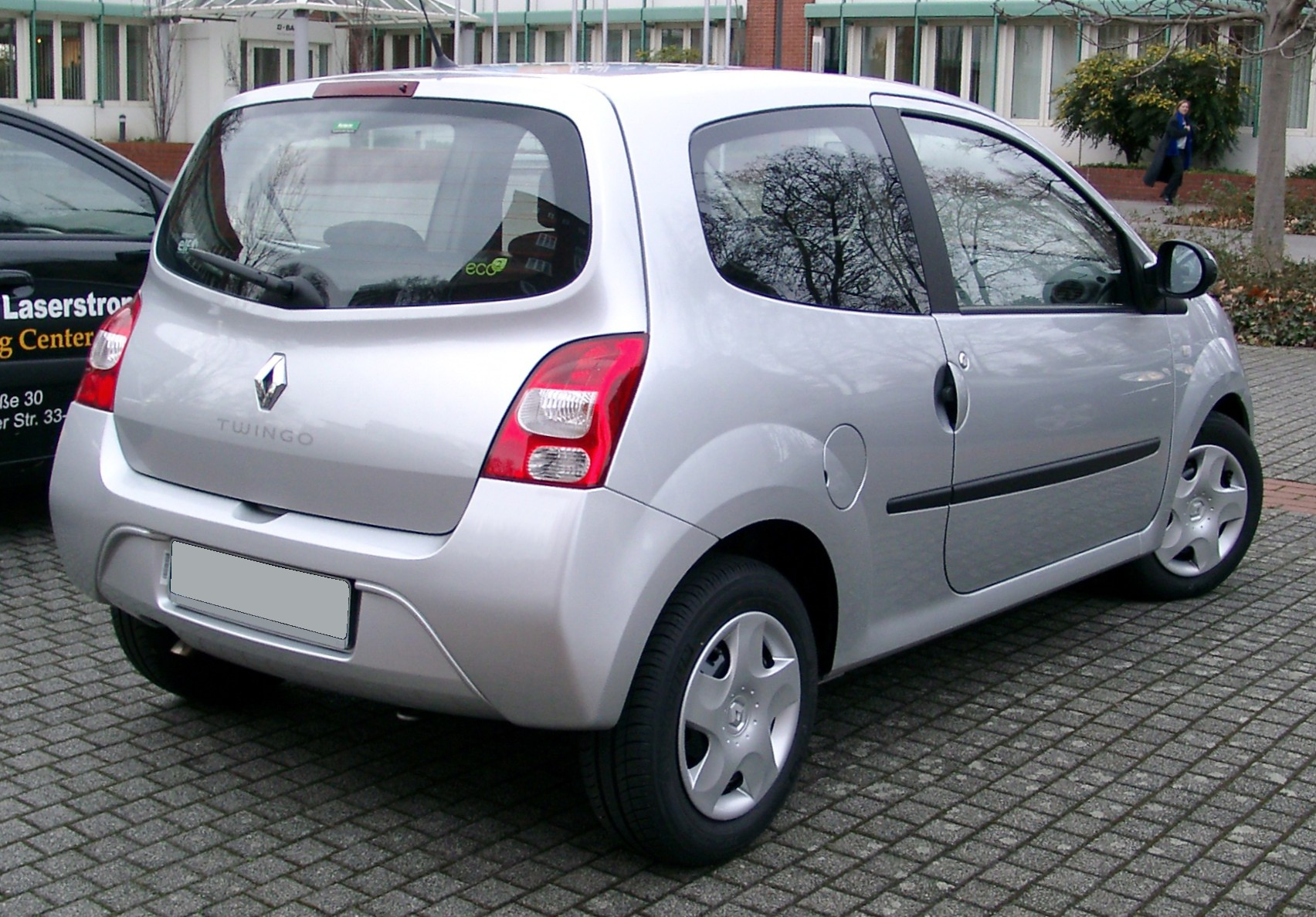 Renault Twingo, 2. Generation